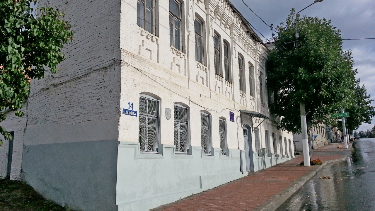 Беларуская (тарашкевіца): Забудова вул. Калініна. г. Віцебск This is a photo of Belarusian heritage monument. Reference number: 213Г000033 ( WLM)